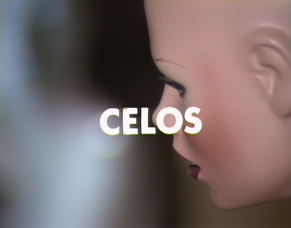 Entrada de la teleserie Celos